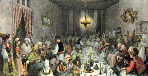 משתה של יהודים באלג'יר (1835)